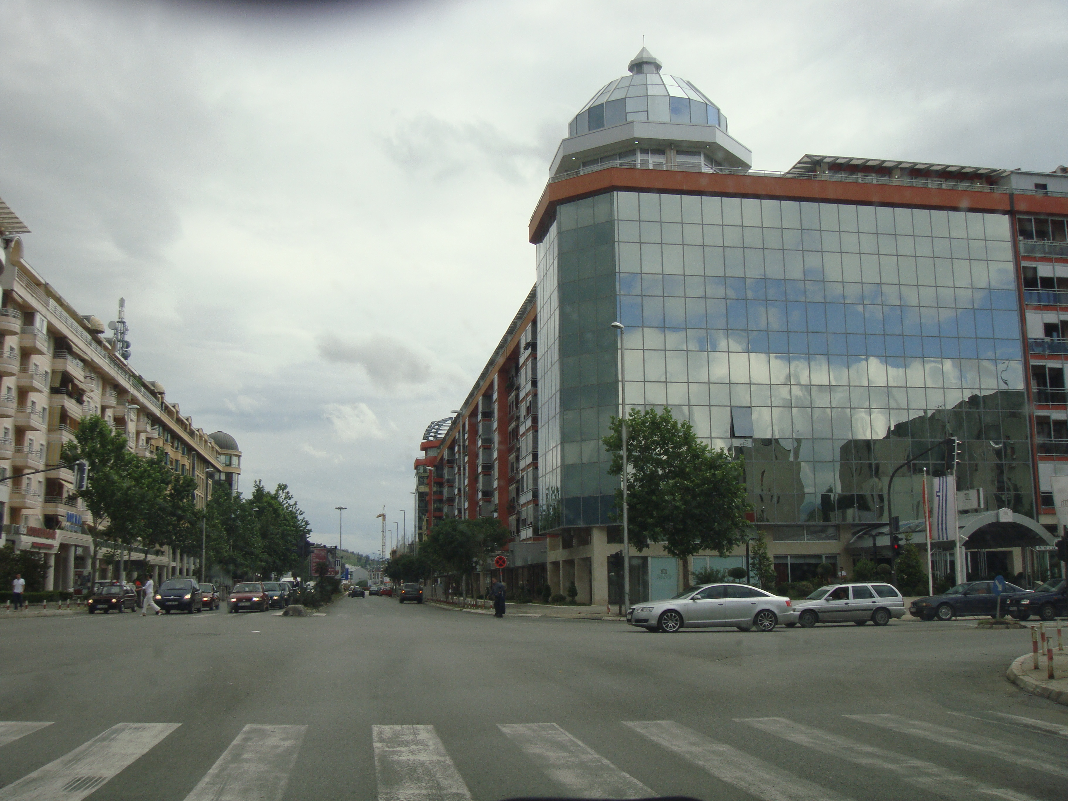 Blok 5, Podgorica, Montenegro